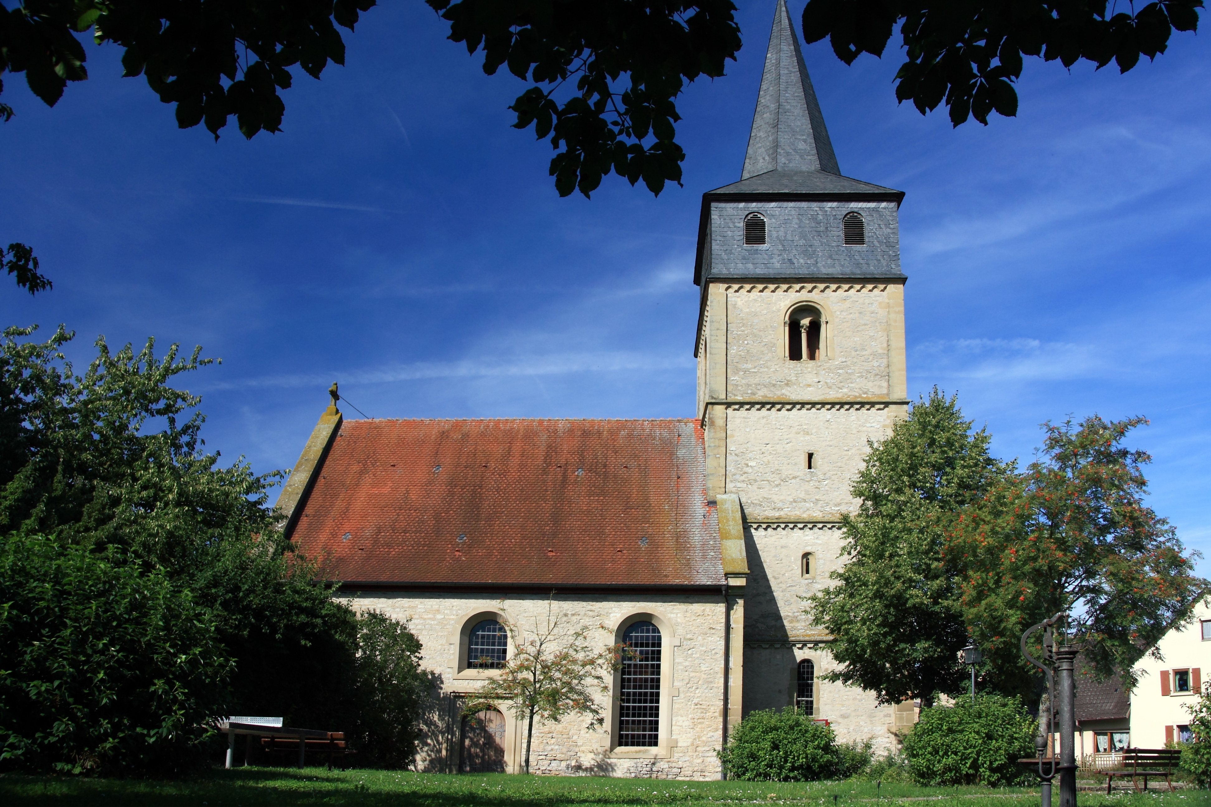 Die Kirche im Weikersheimer Ortsteil Nassau.